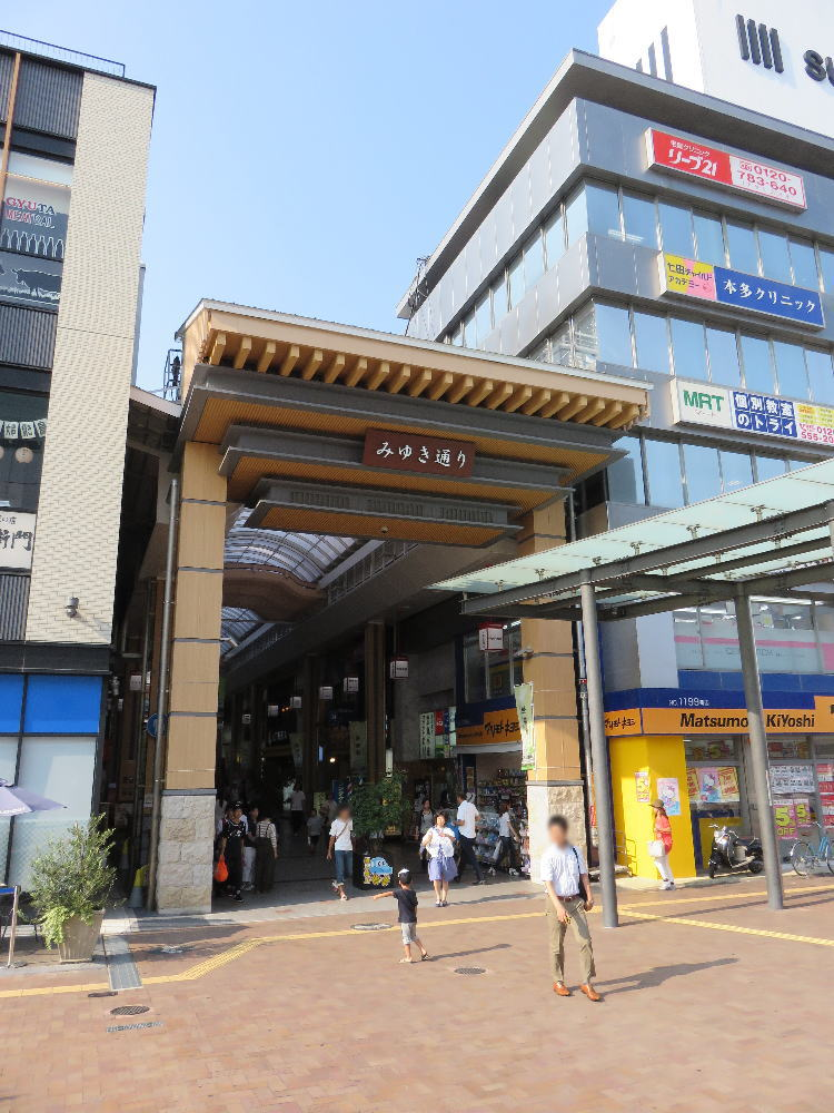 兵庫県姫路市の「みゆき通り商店街」南側（ＪＲ姫路駅側）